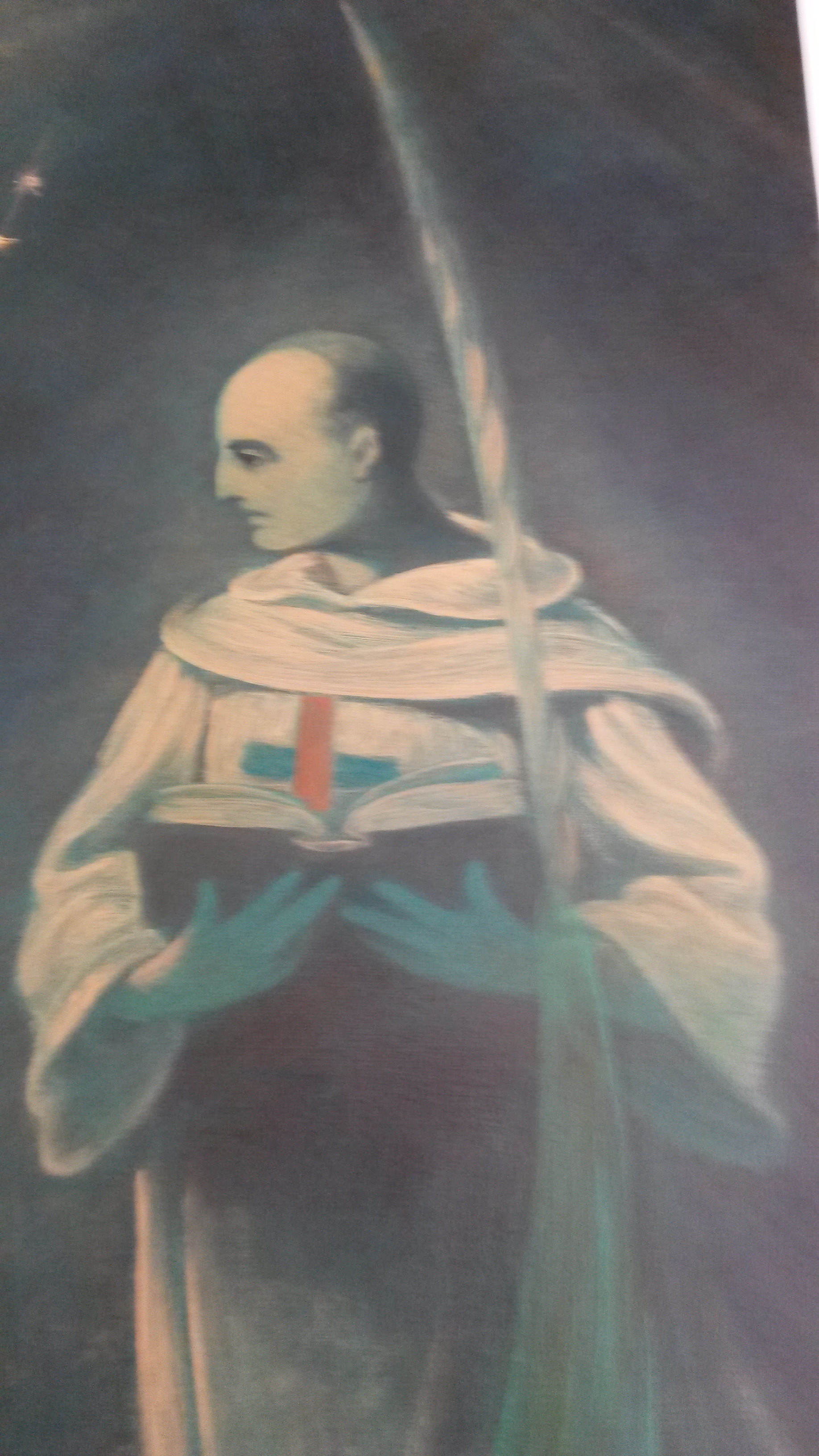 Particular del cuadro de San Hermenegildo de la Asunción y compañeros mártires que se venera en la iglesia de San Carlino alle quattro Fontane de Roma.